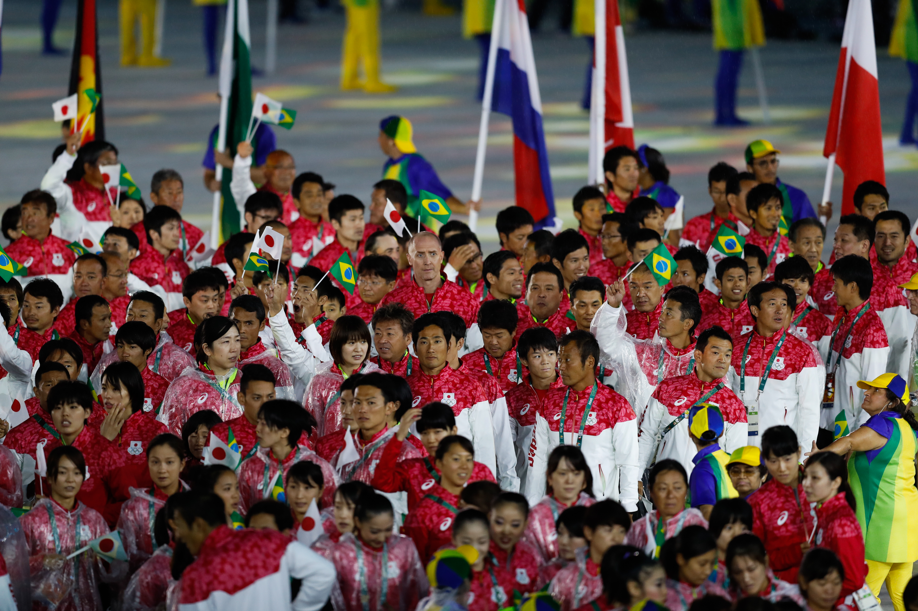 Rio de Janeiro - Cerimônia de encerramento dos Jogos Olímpicos Rio 2016, no Maracanã (Fernando Frazão/Agência Brasil)